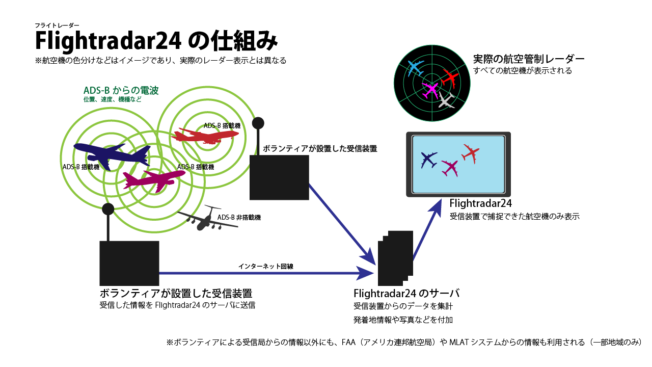 Flightradar24の仕組み。自作の図+商用利用フリーの素材集からの図を利用。